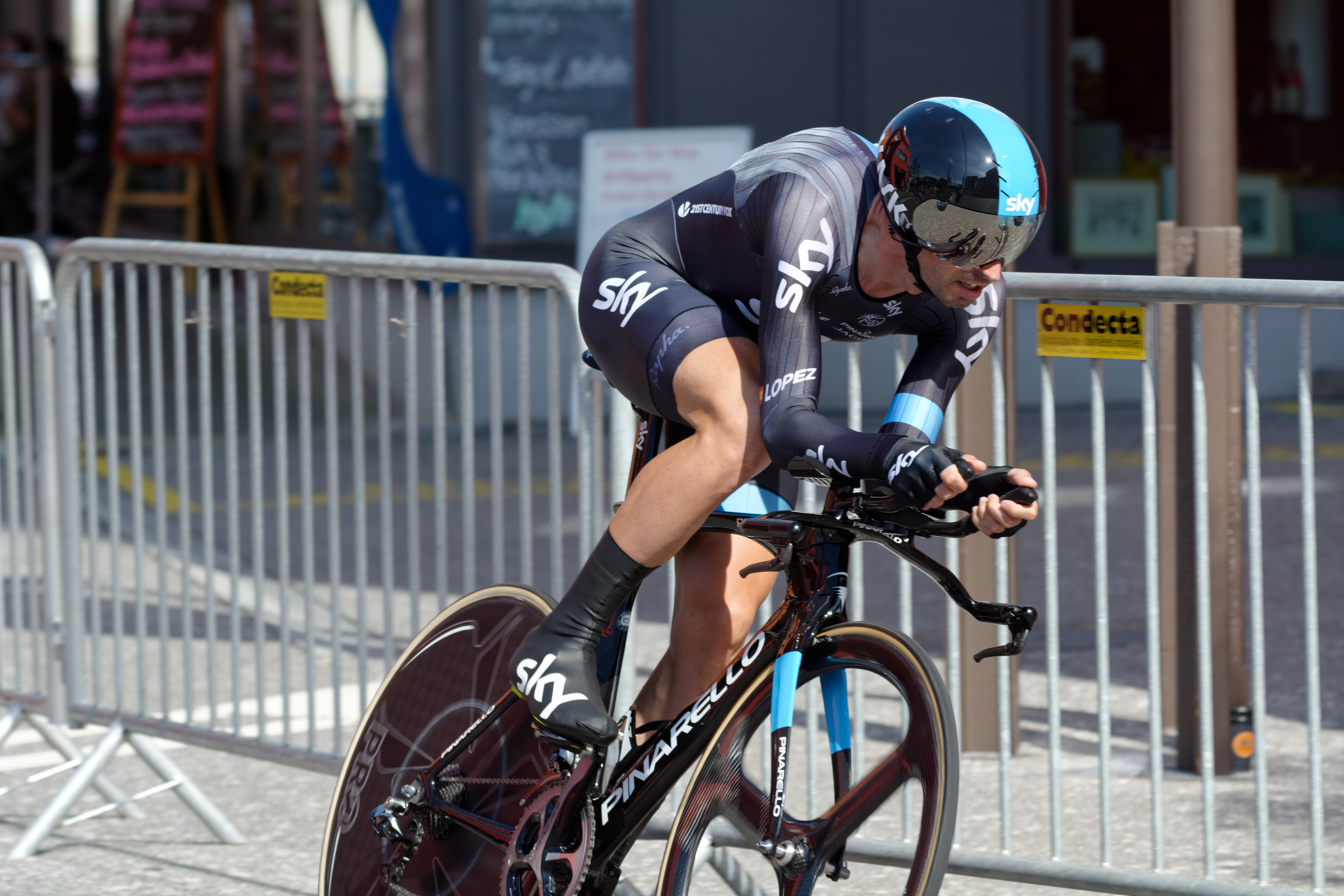 D71_9422_DxO